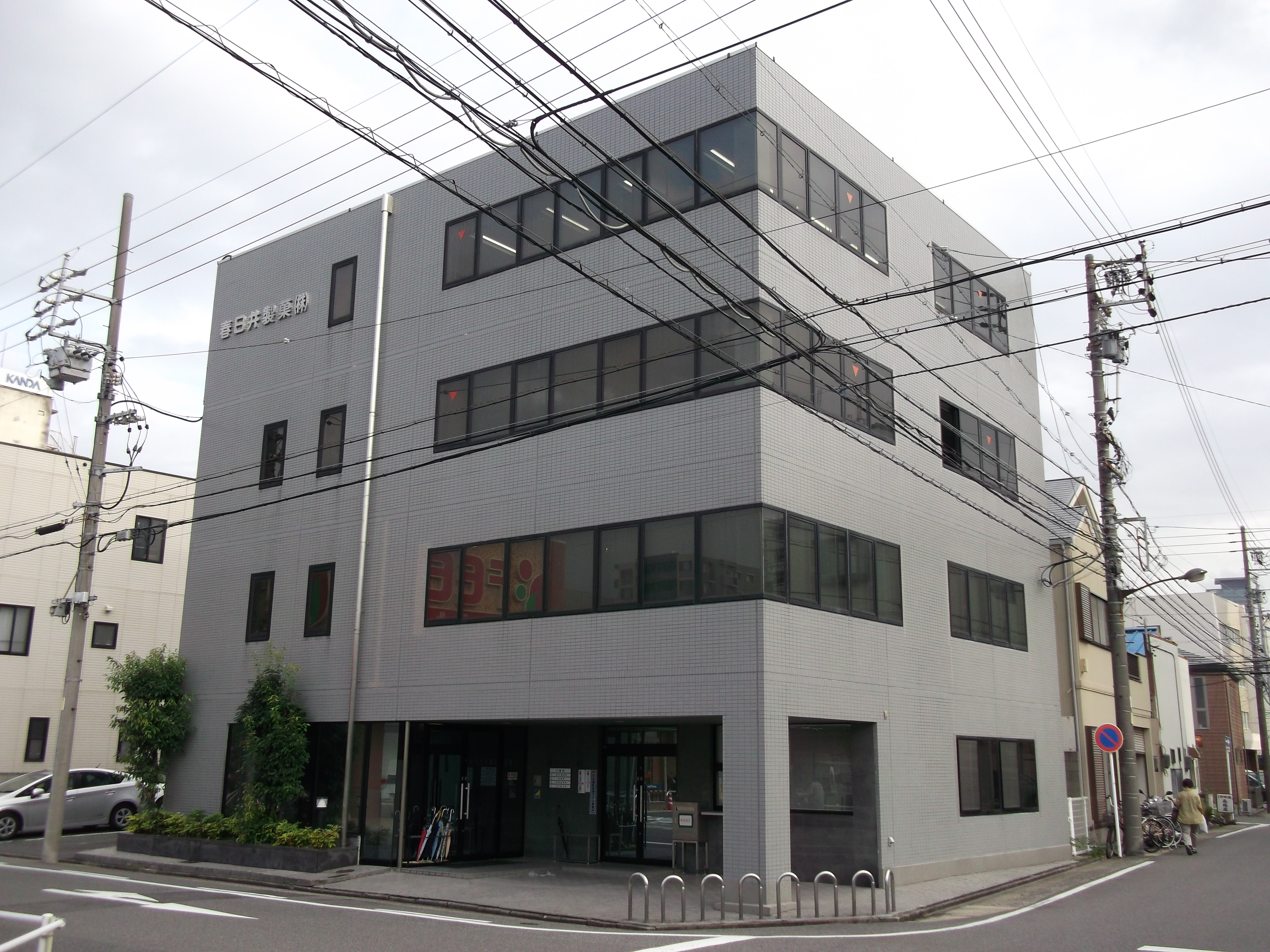 名古屋市西区の春日井製菓本社を西側公道北側より撮影